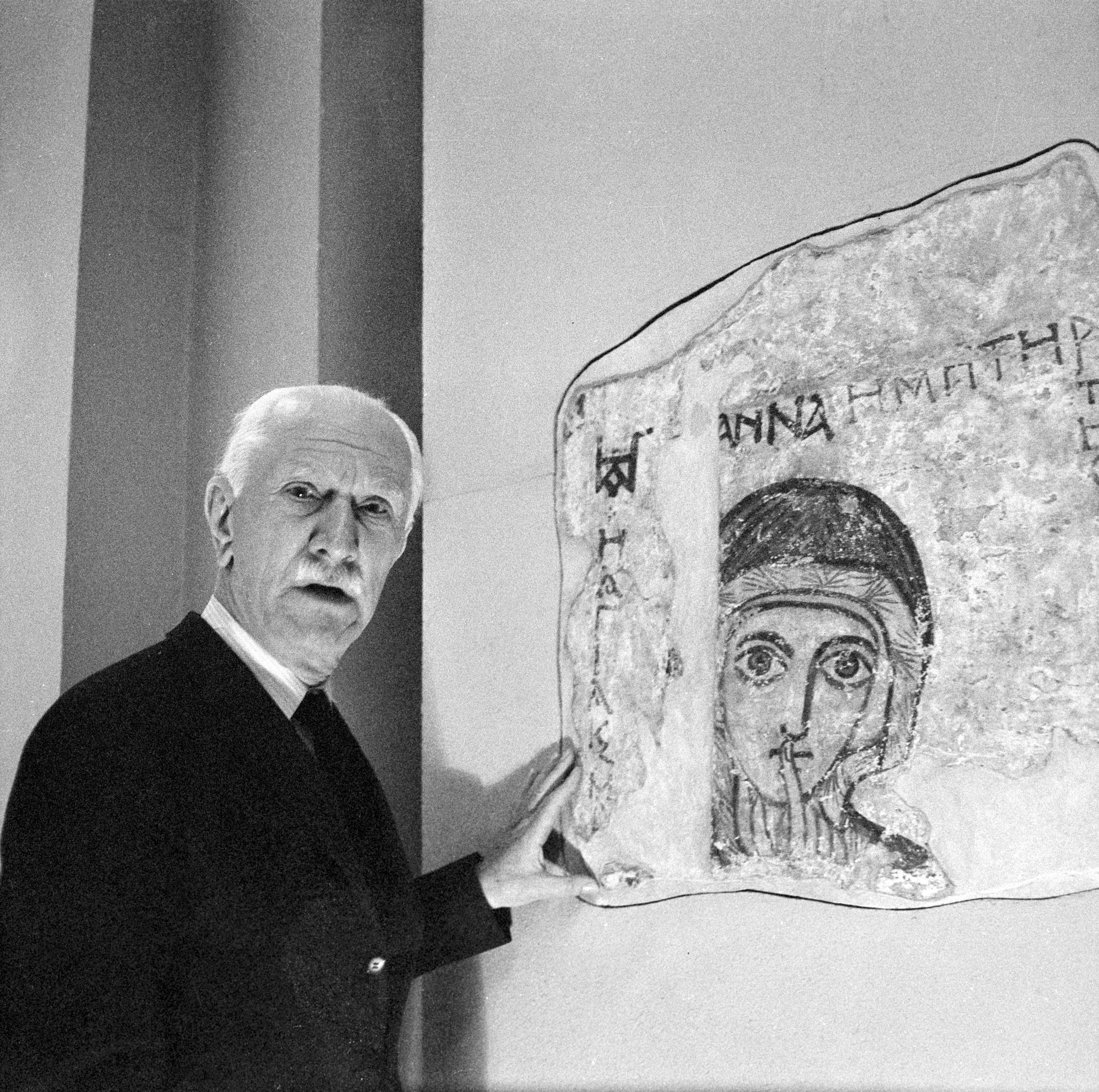 Kazimierz Michałowski na tle malowideł z Faras, Muzeum Narodowe w Warszawie